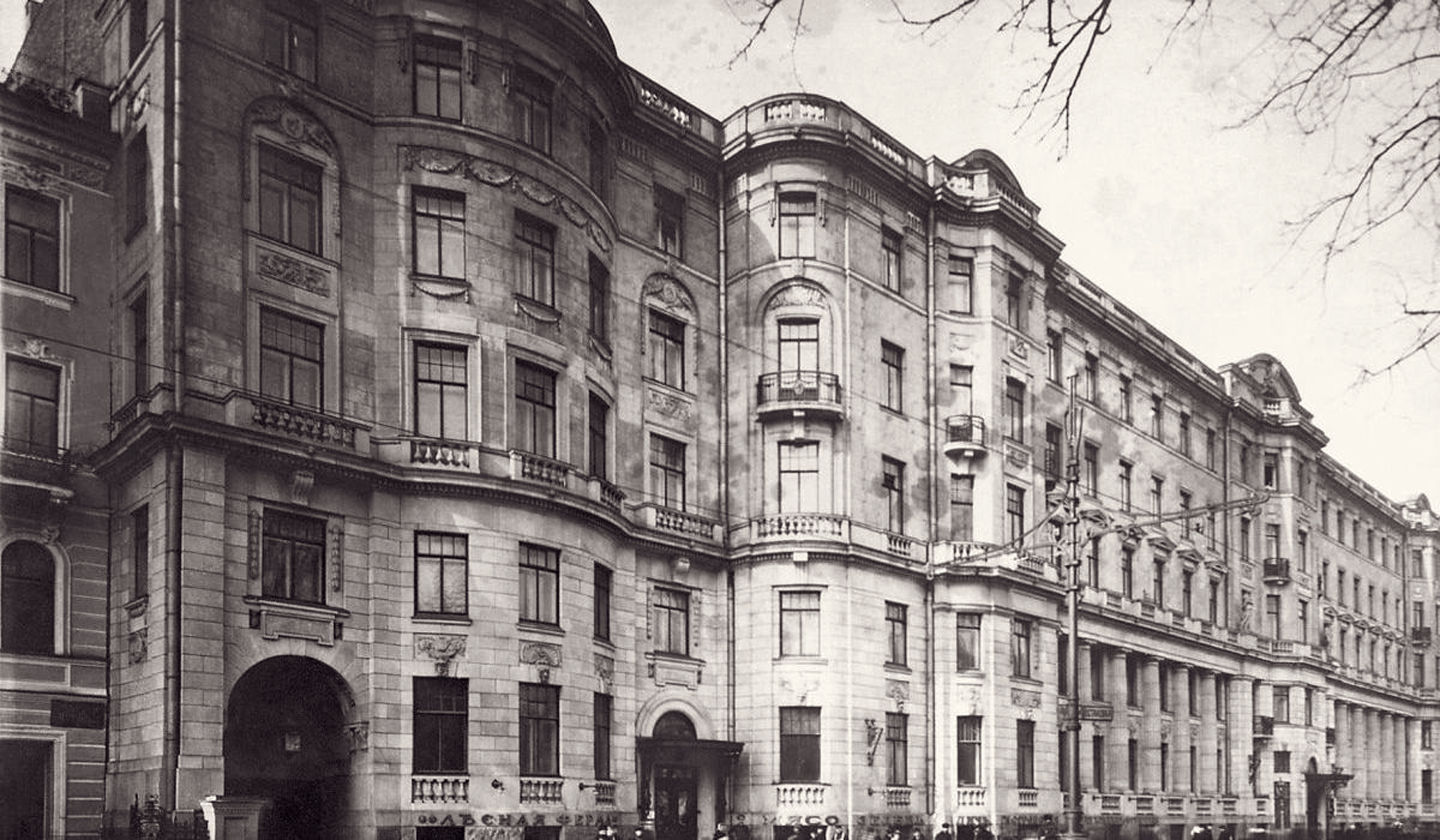 Фасад дома Первого Российского страхового общества со стороны Каменноостровского проспекта № 26-28 (ок. 1915 г).